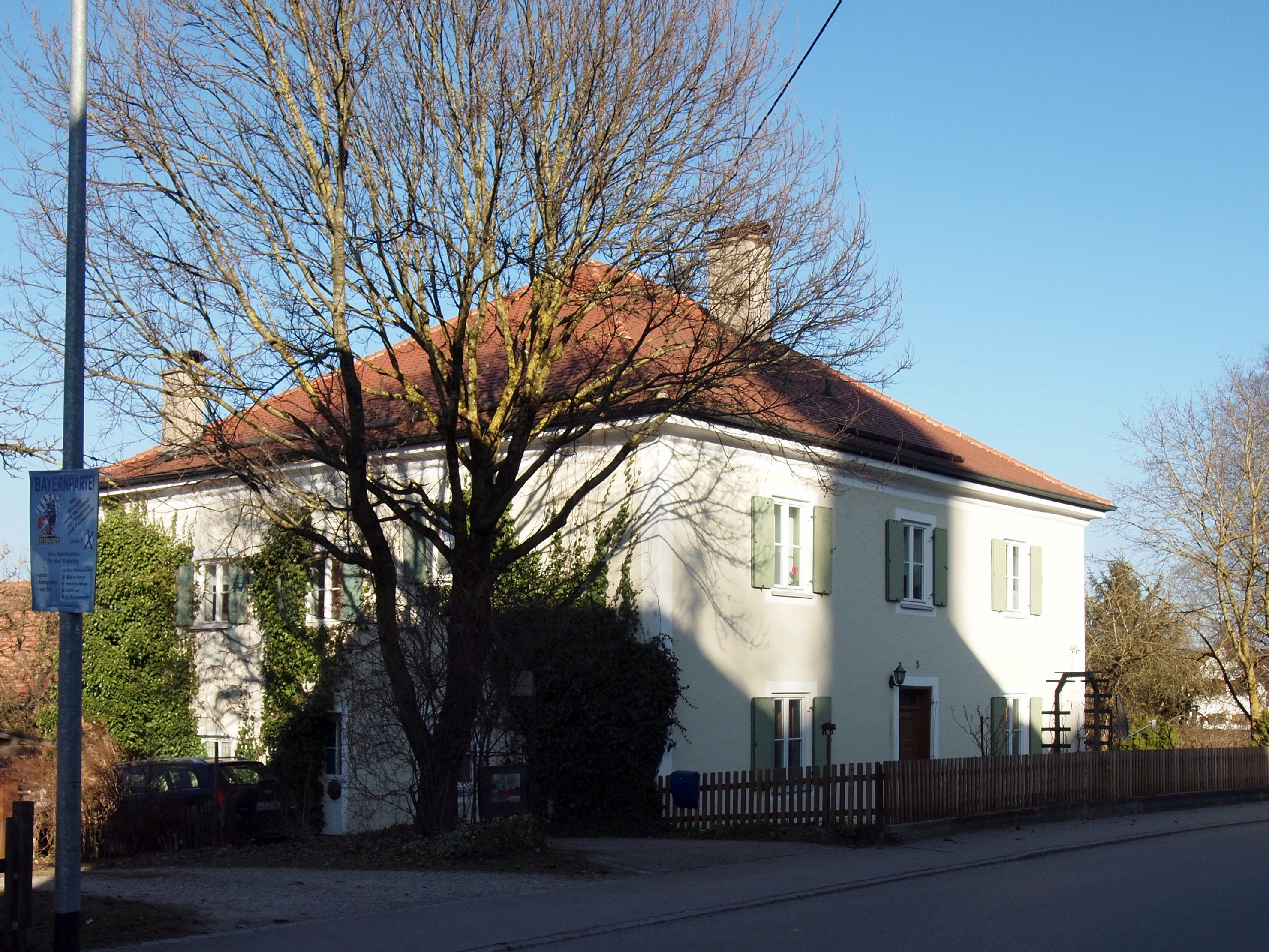 Ehemaliges Pfarrhaus Issing, Wessobrunner Straße 5, Gemeinde Vilgertshofen